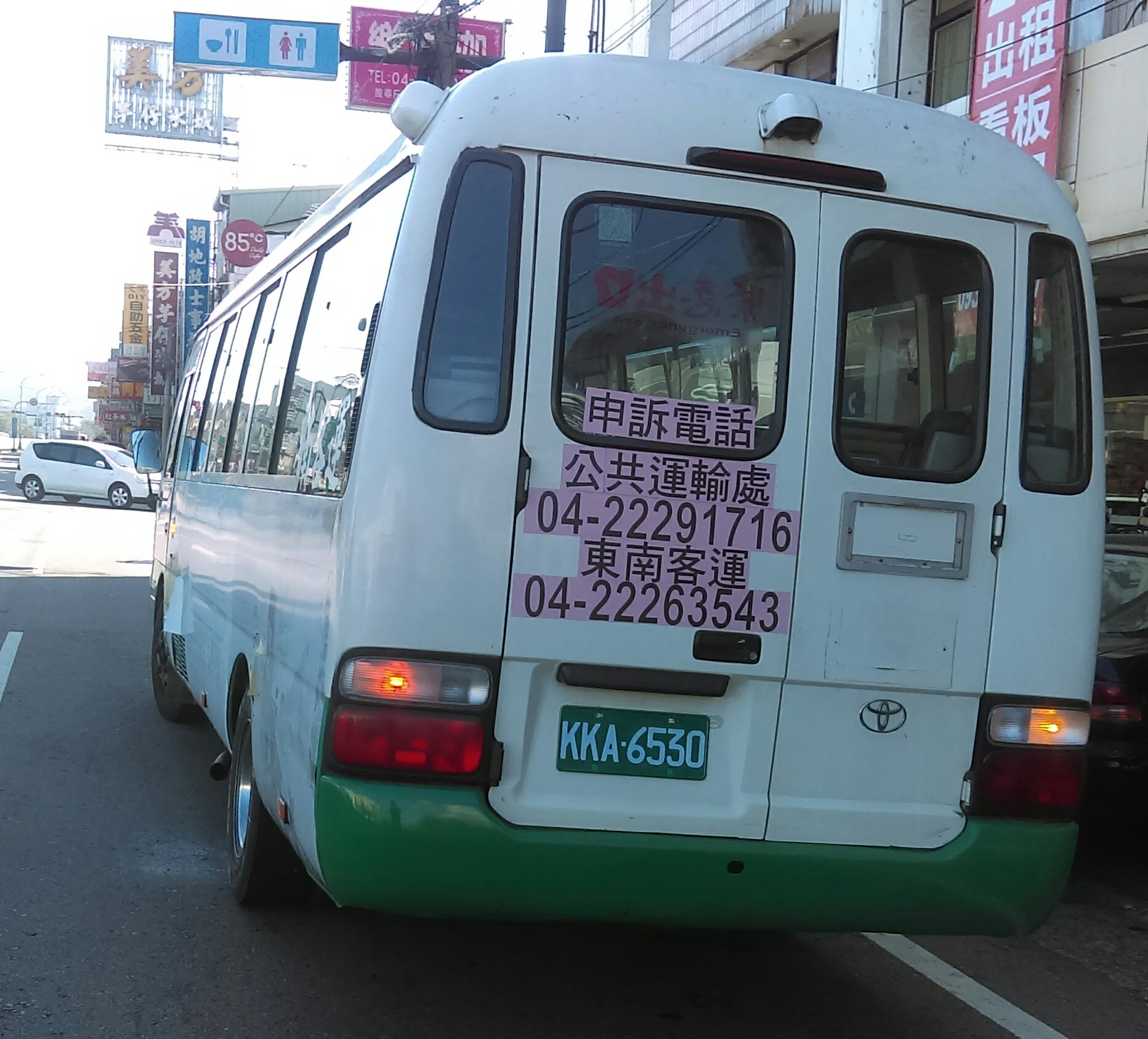 復興八街口 17 草湖